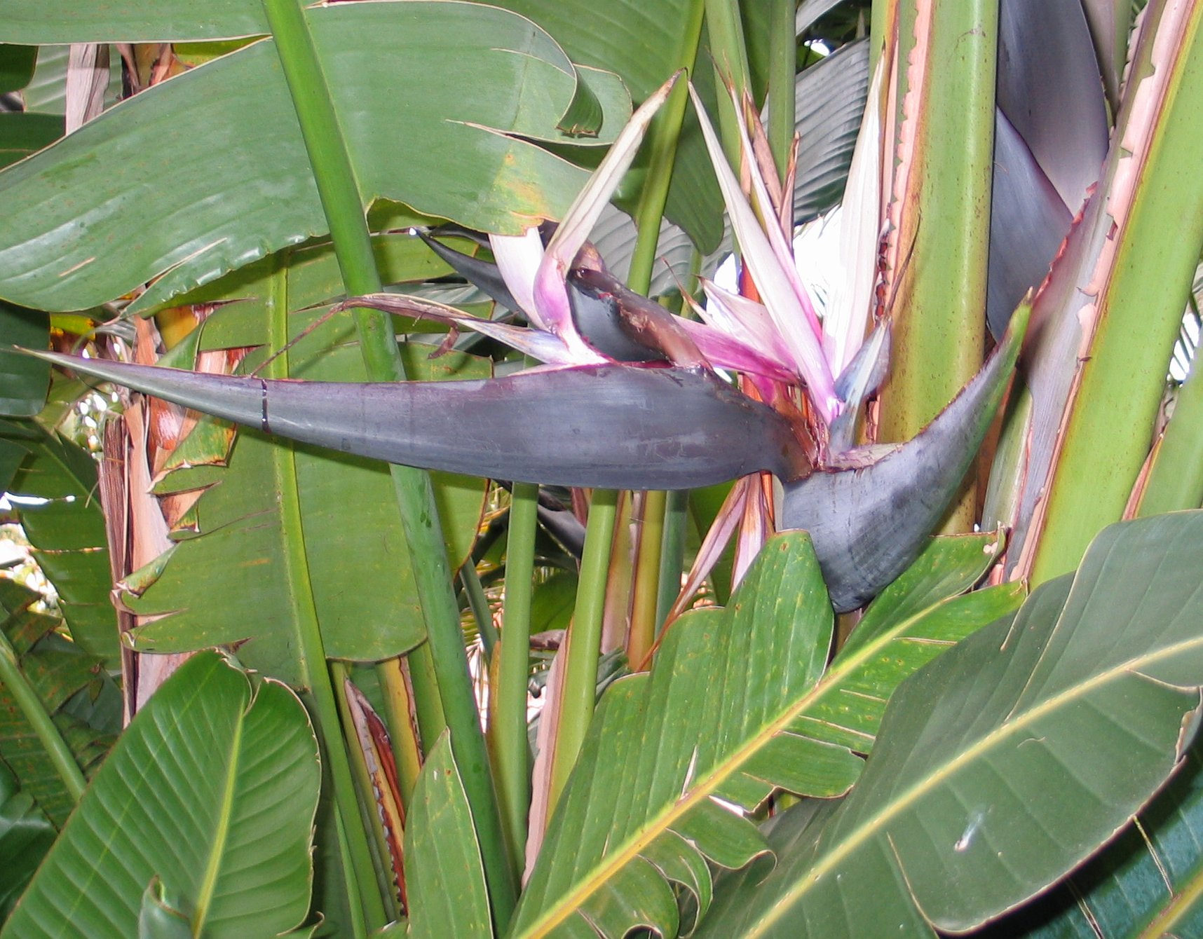 Strelitzia nicolai flower